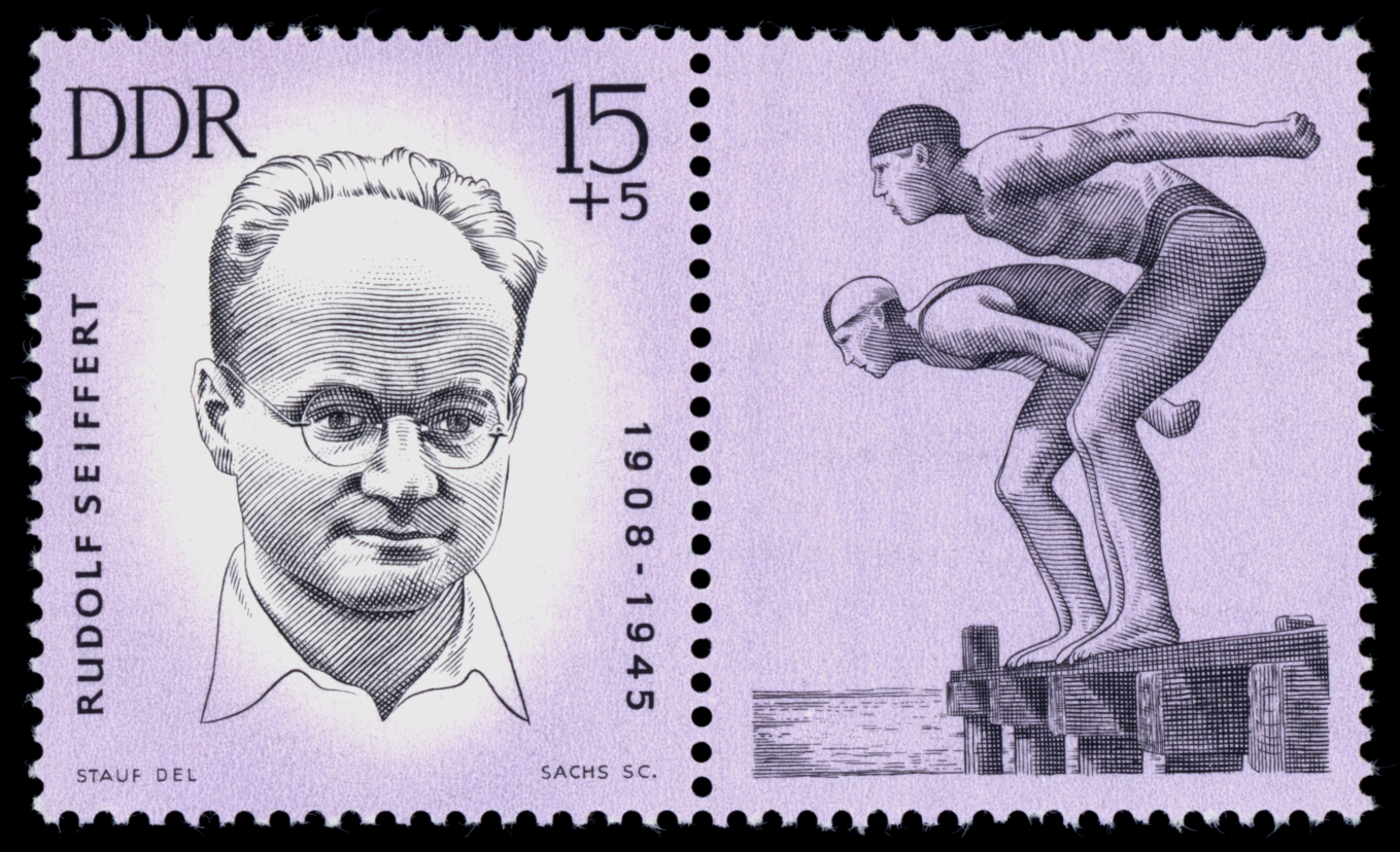 Information: Ausgabepreis: Pfennig First Day of Issue / Erstausgabetag: Auflage: Entwurf: Druckverfahren: Michel-Katalog-Nr: Ländercode-MiNr